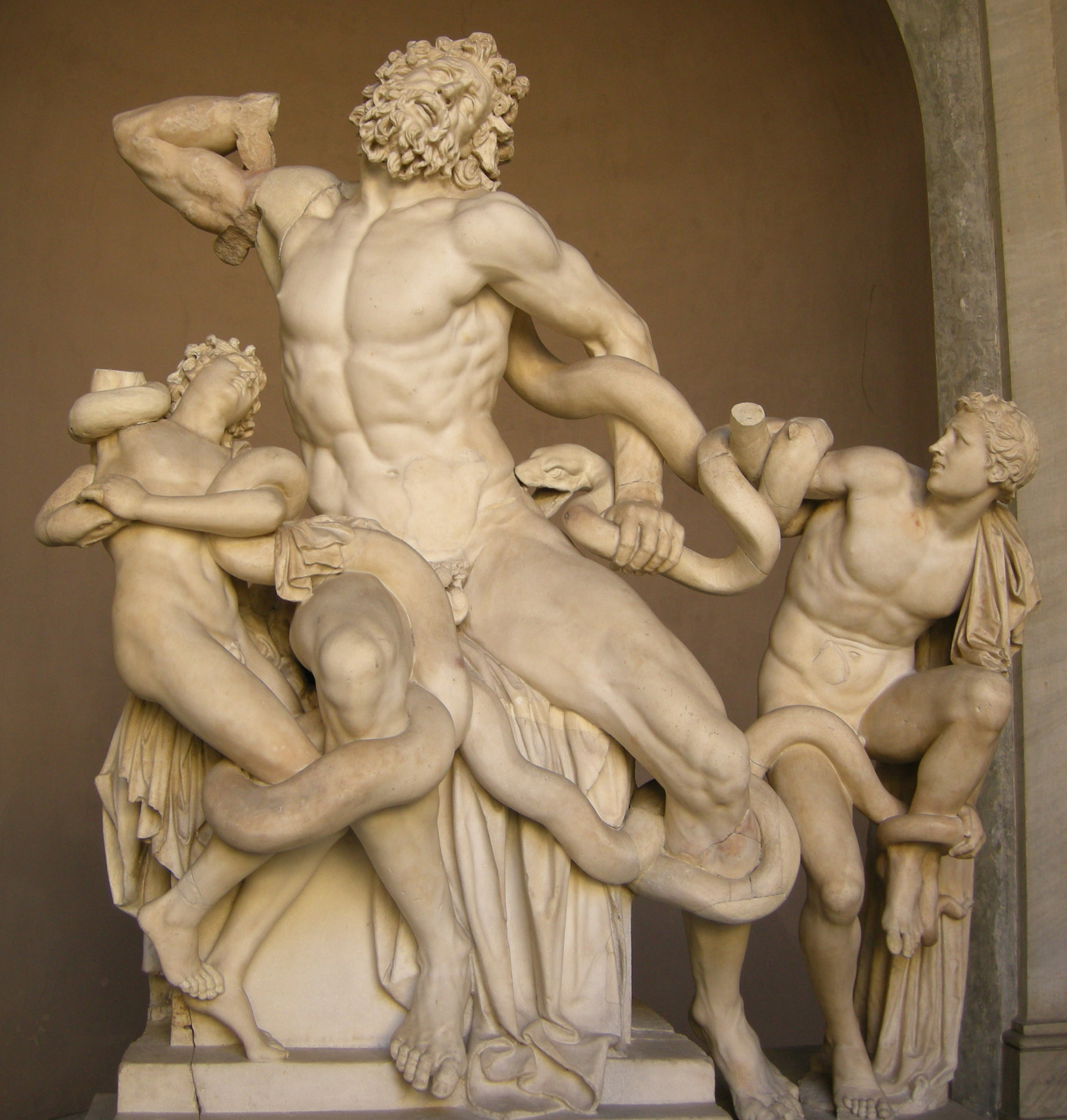 Gruppo del laocoonte